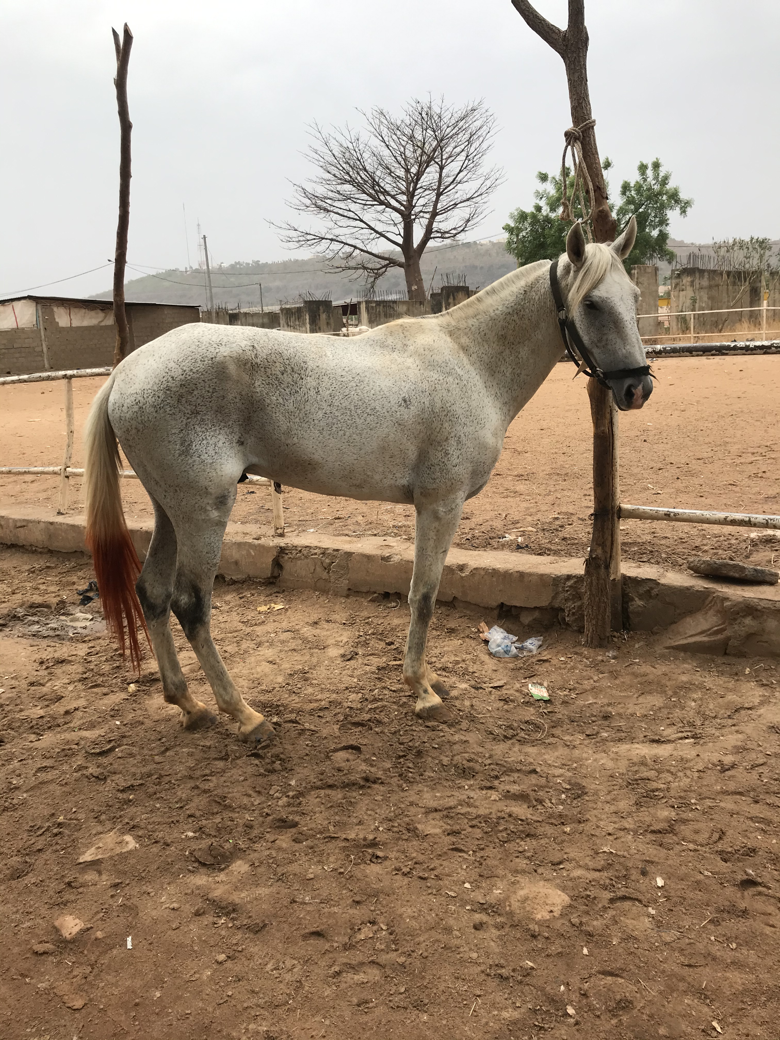 Champs de course hippique de Bamako This is an image with the theme "Africa on the Move or Transport" from: Mali